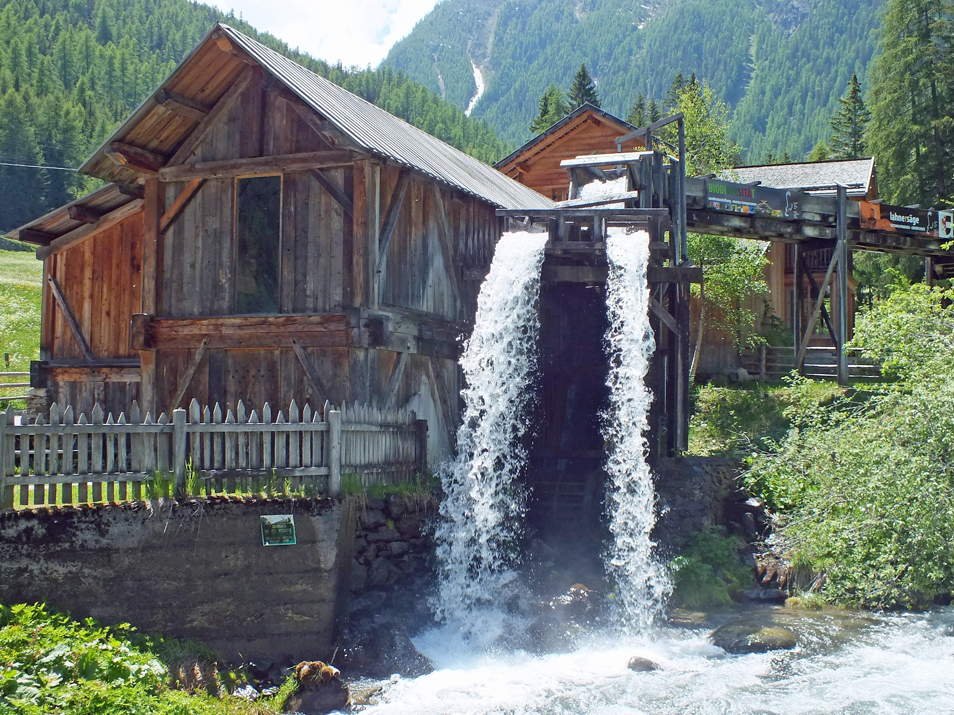 Die Lahner Säge an der Falschauer in St. Gertraud